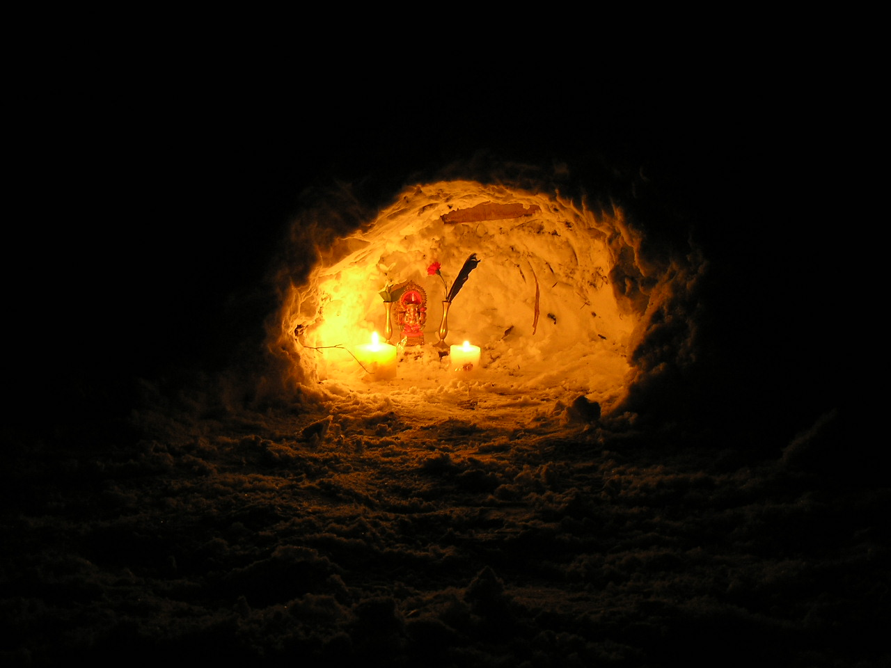 Kamakura of Hyogo 兵庫県のかまくら